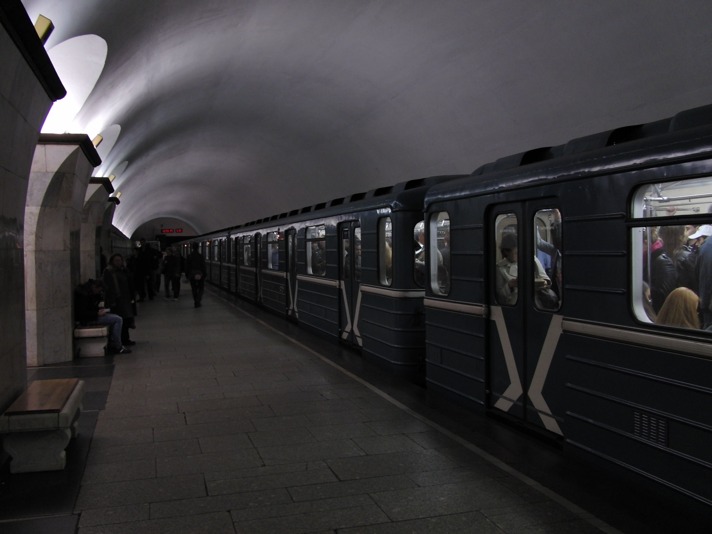 Prospekt Mira-radialnaya (Проспект Мира-радиальная)